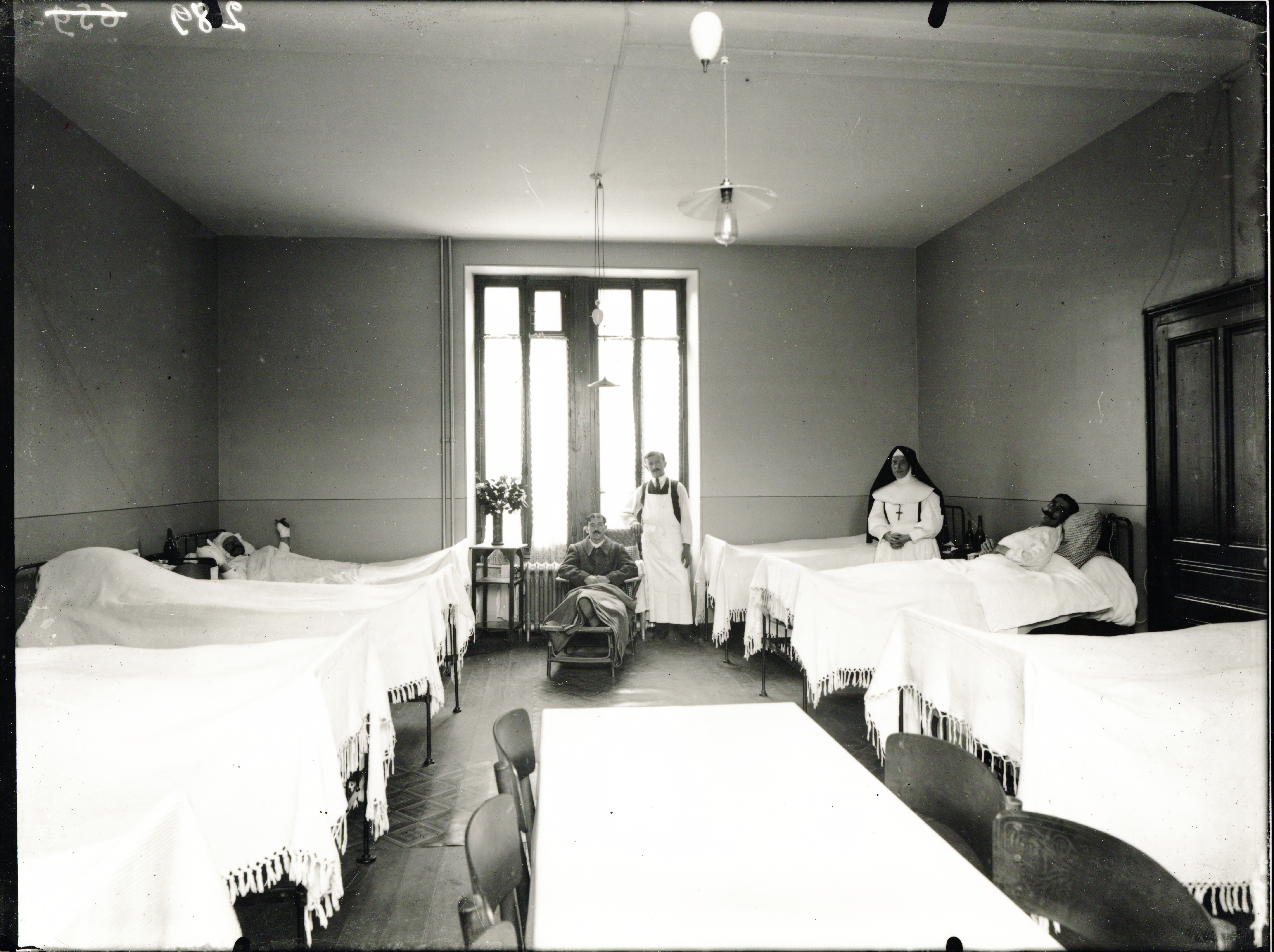 Le dispensaire en 1916, créé par Paul Girod